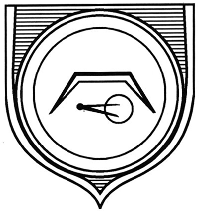 herb Międzybrodzia Żywieckiego